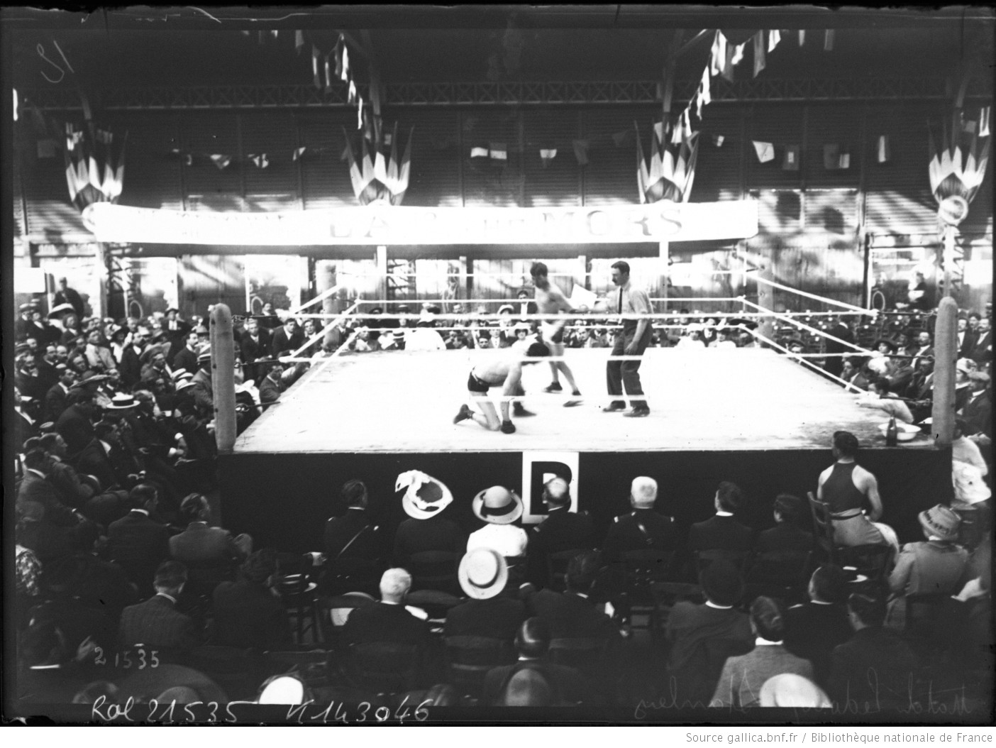 Match de boxe entre Charles Ledoux et Digger Stanley à Dieppe le 23 juin 1912.